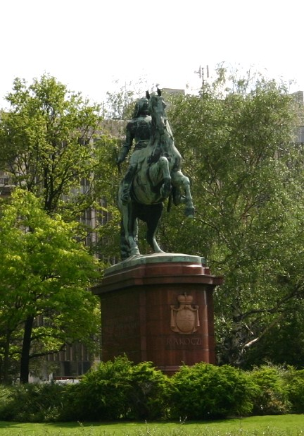 Denkmal des Fürsten Ferenc II. Rákóczi in Budapest